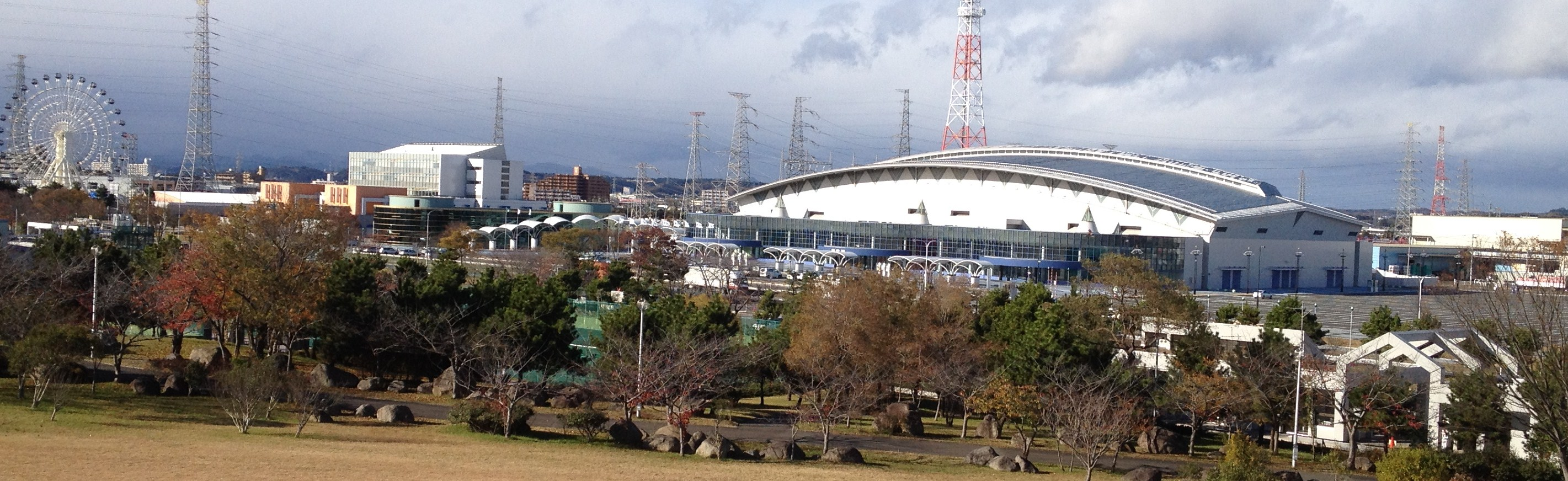 仙台港中央公園から夢メッセみやぎを望む